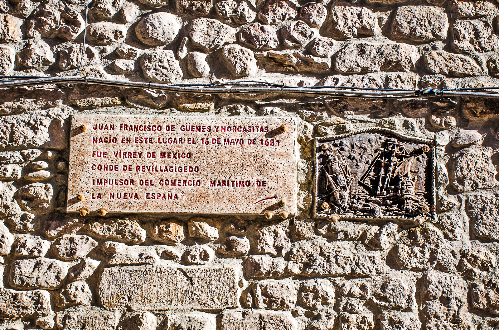 Casa natal de Juan Francisco Güemes y Horcasitas. Placa informativa y bajorrelieve de motivo marítimo. Reinosa (Cantabria - España)